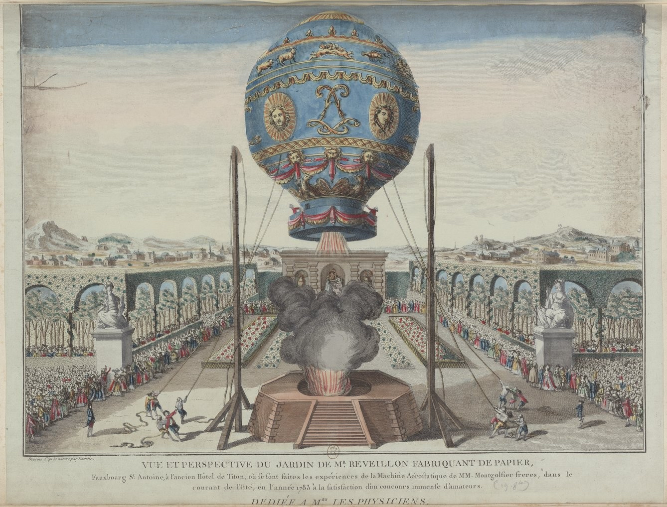 Ascension captive d'une montgolfière (Jean-François Pilâtre de Rozier) dans les jardins de la papèterie Réveillon, le 19 octobre 1783. «Vue et perspective du jardin de Mr. Réveillon fabriquant de papiers, Fauxbourg St Antoine, à l'ancien Hôtel de Titon, où se sont faites les expériences de la Machine Aërostatique de M.M. Montgolfier frères, dans le courant de l'Eté, en l'année 1783, à la satisfaction d'un concours immense d'amateurs - Dédiée à Mrs. les Physiciens»